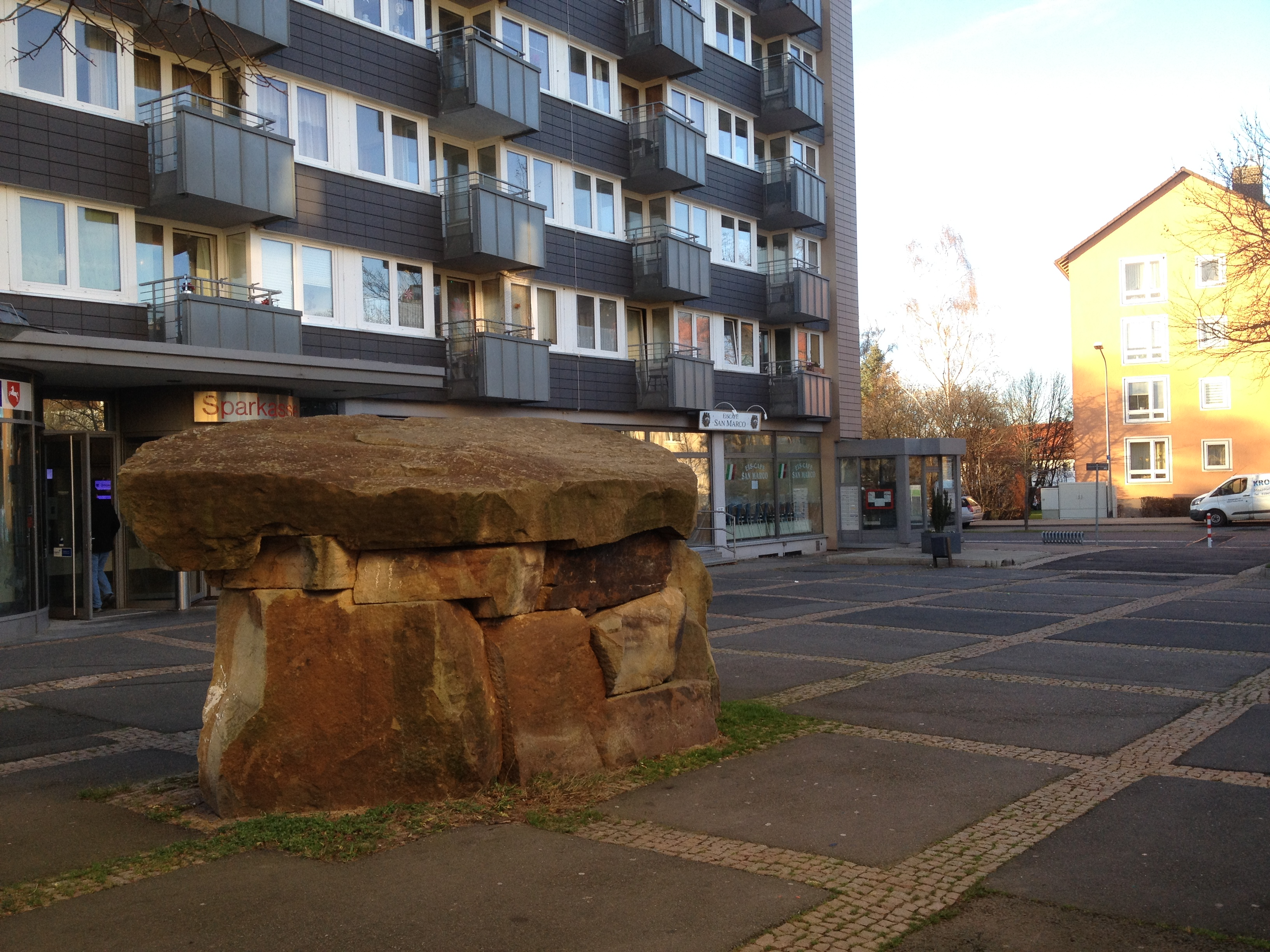 Marktplatz Jürgenohl, Skulptur Kopf von Reinhard Buxel (1985)